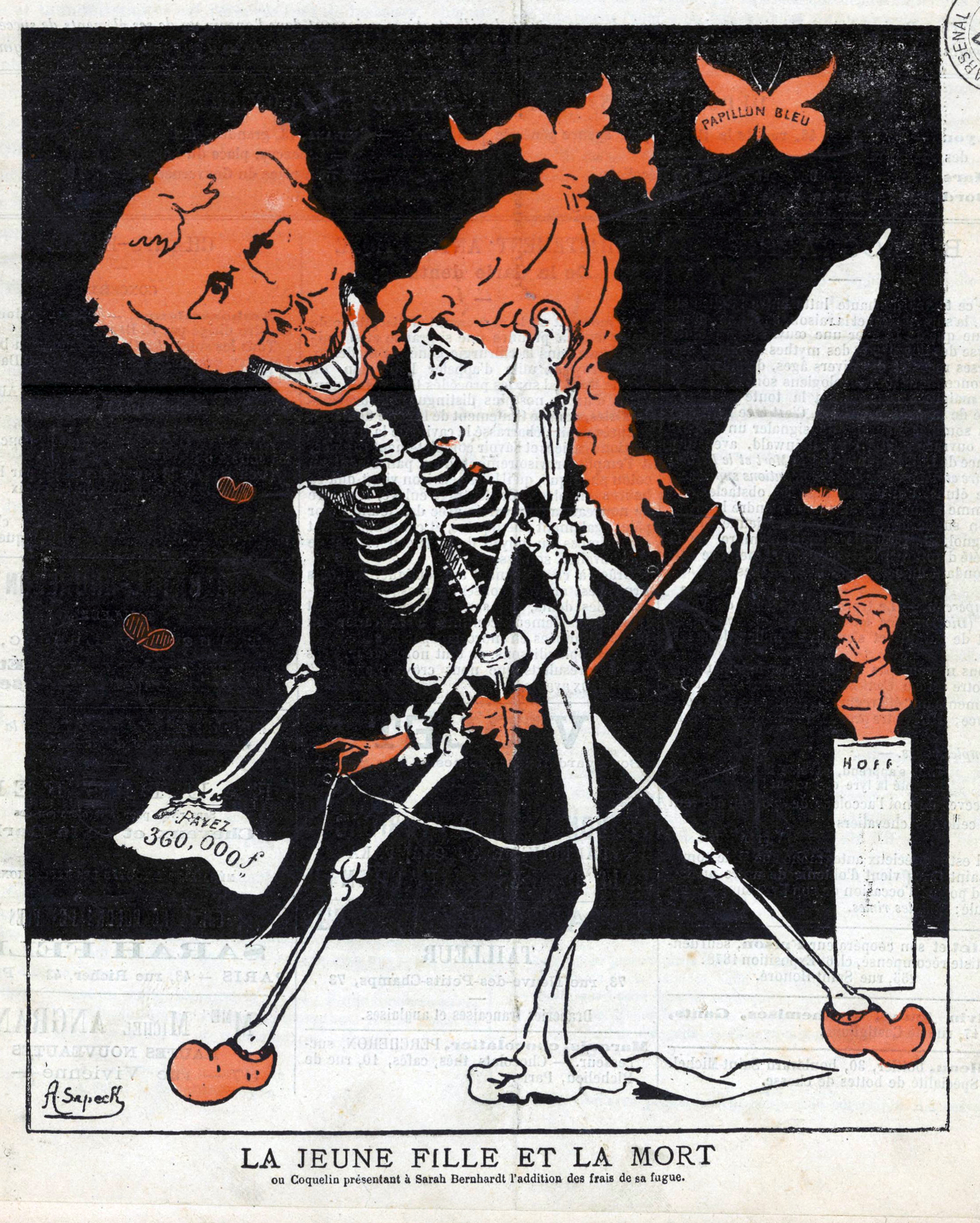 Sous-titre : ou Coquelin présentant à Sarah Bernhardt l'addition des frais de sa fugue. Caricature publiée dans Tout-Paris, supplément de L'Hydropathe.